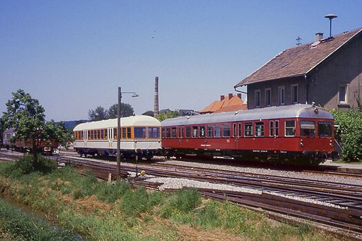 MaK Triebwagen VT 0521 und Beiwagn VB181 im alten SWEG Bahnhof Odenheim